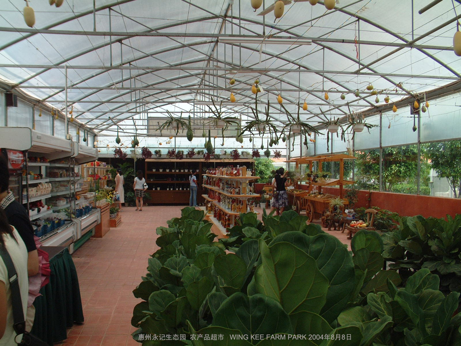 2004年惠东 永记生态园